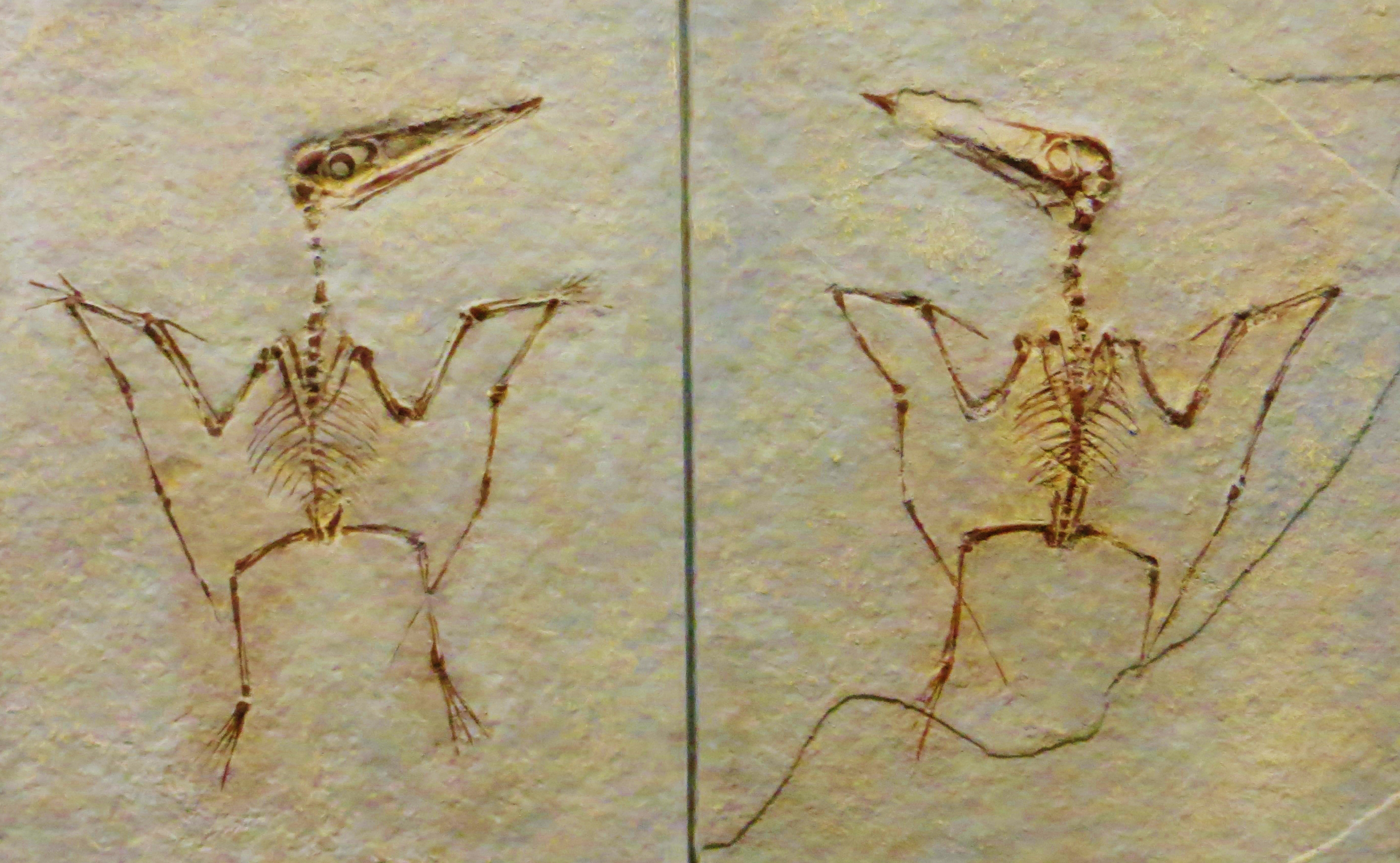 Cast of the part and counterpart of the holotype specimen of Pterodactylus spectabilis (now considered juvenile P. antiquus), TM 10341, Museo di Storia Naturale di Verona